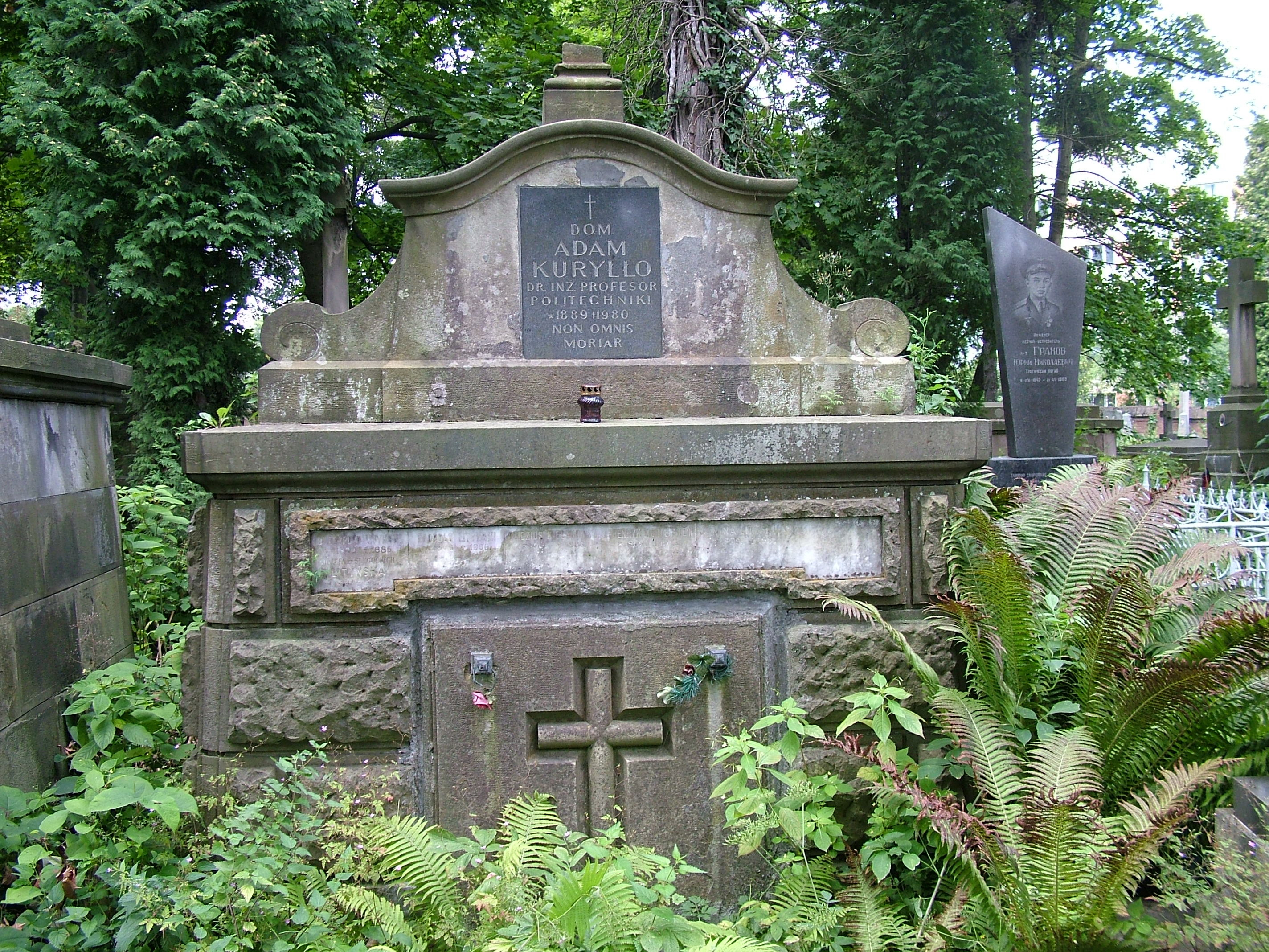 Grobowiec Lityńskich, w którym pochowany jest prof. Adam Kuryłło